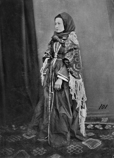 Ингушка в традиционном костюме. Фотограф Д.А. Никитин. 1881 г.